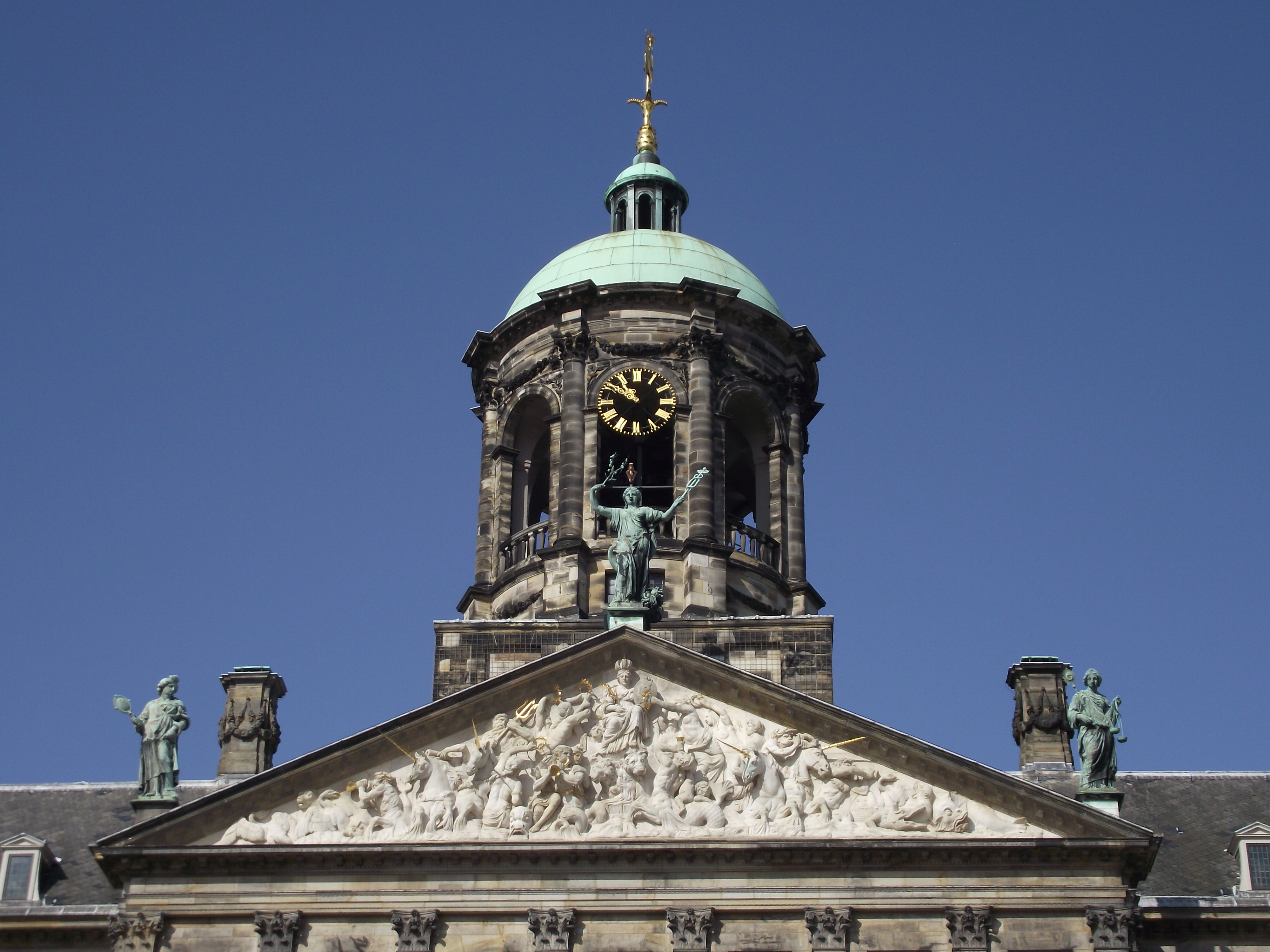 Amsterdam, Koninklijk Paleis, J.van Campen e D.Stalpaert, 1648-65